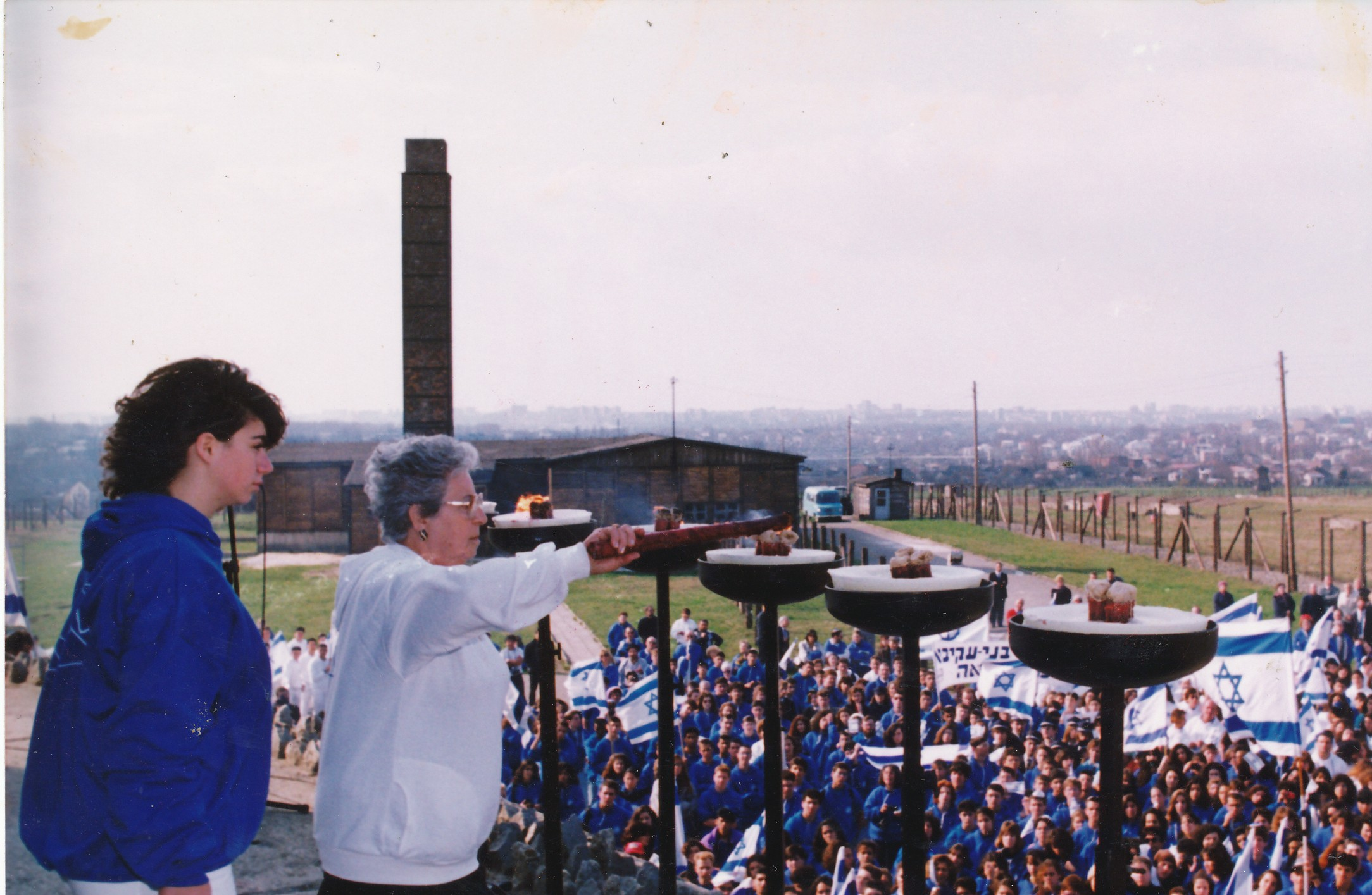 פלה מדליקה משואות בטקס במיידאנק1990